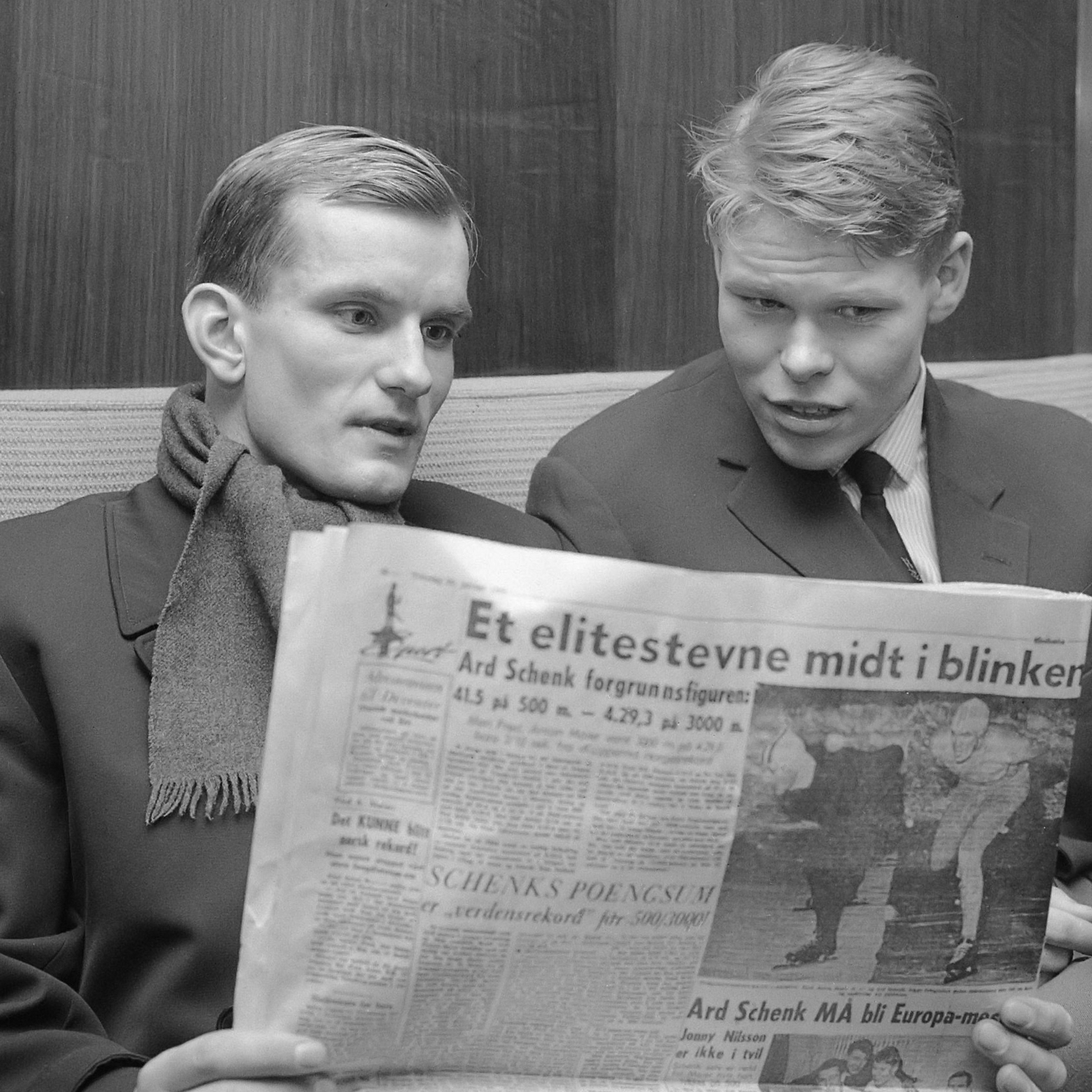 Aankomst Noorse en Nederlandse schaatsploeg op Schiphol, Noren Svein-Erik Stiansen (links) en Per Ivar Moe lezen schaatsberichten in de krant 20 januari 1966